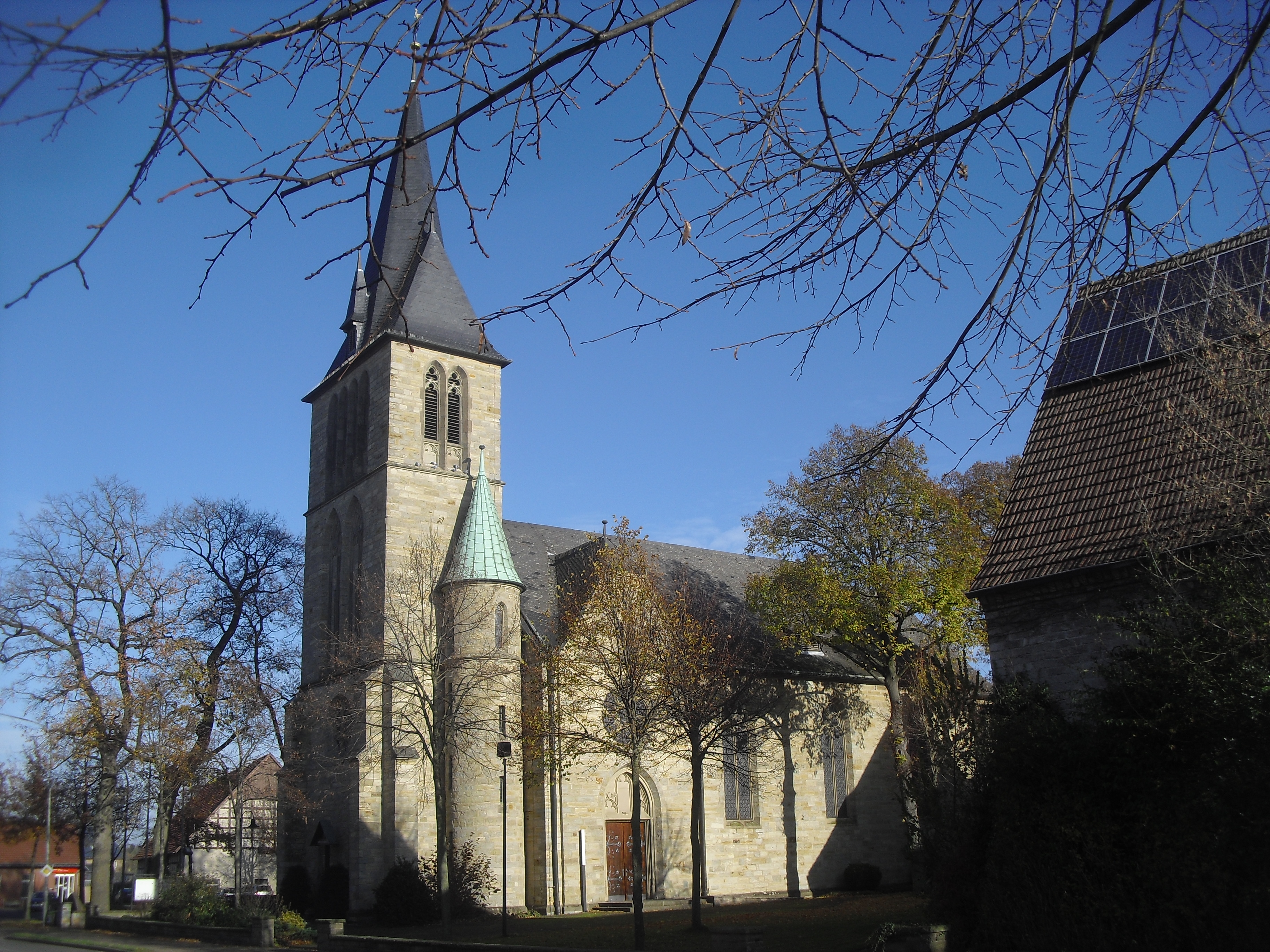 Kath. Pfarrkirche St. Peter und Paul in Scharmede